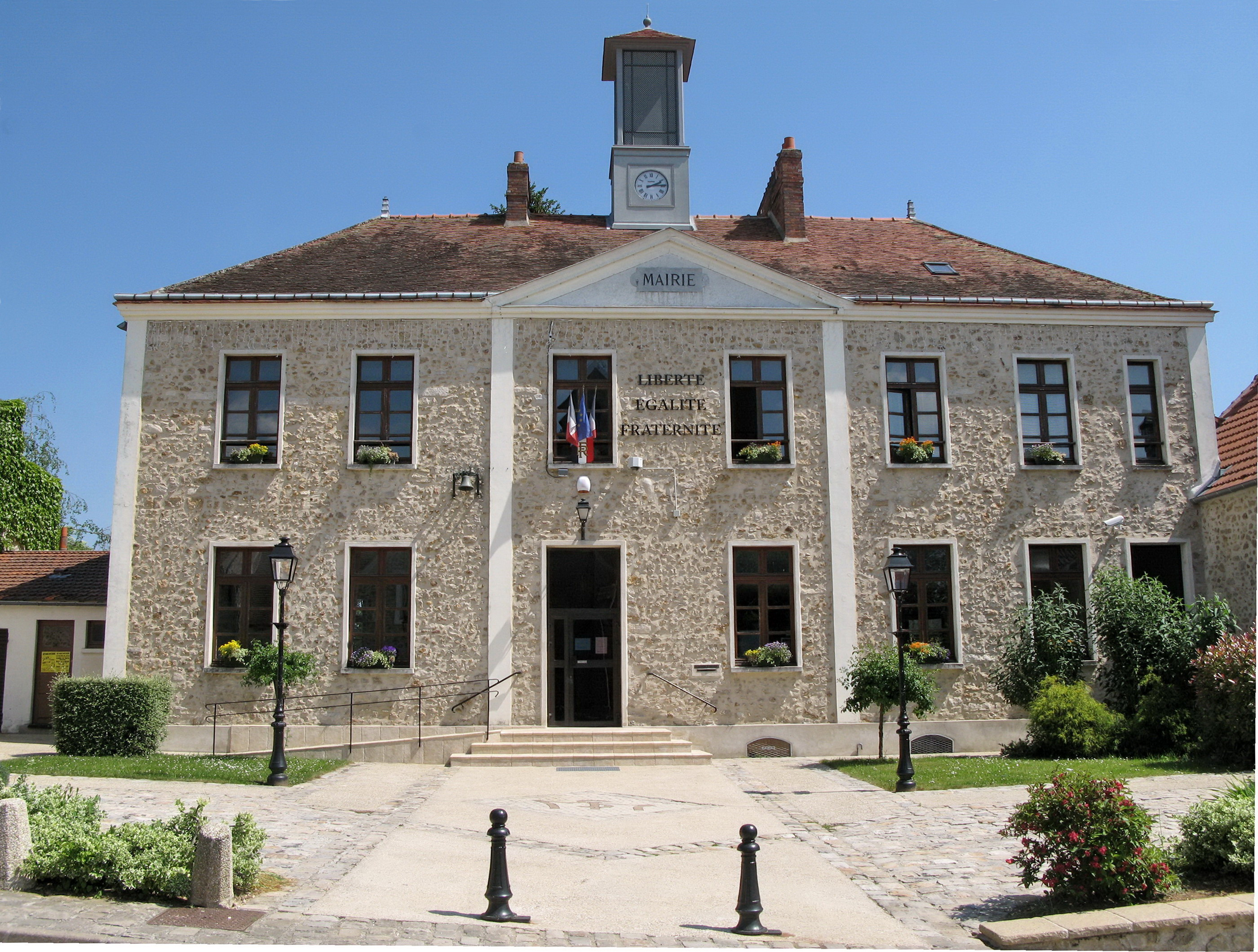 Mairie de la commune de Saint-Maurice-Montcouronne (France, Essonne)